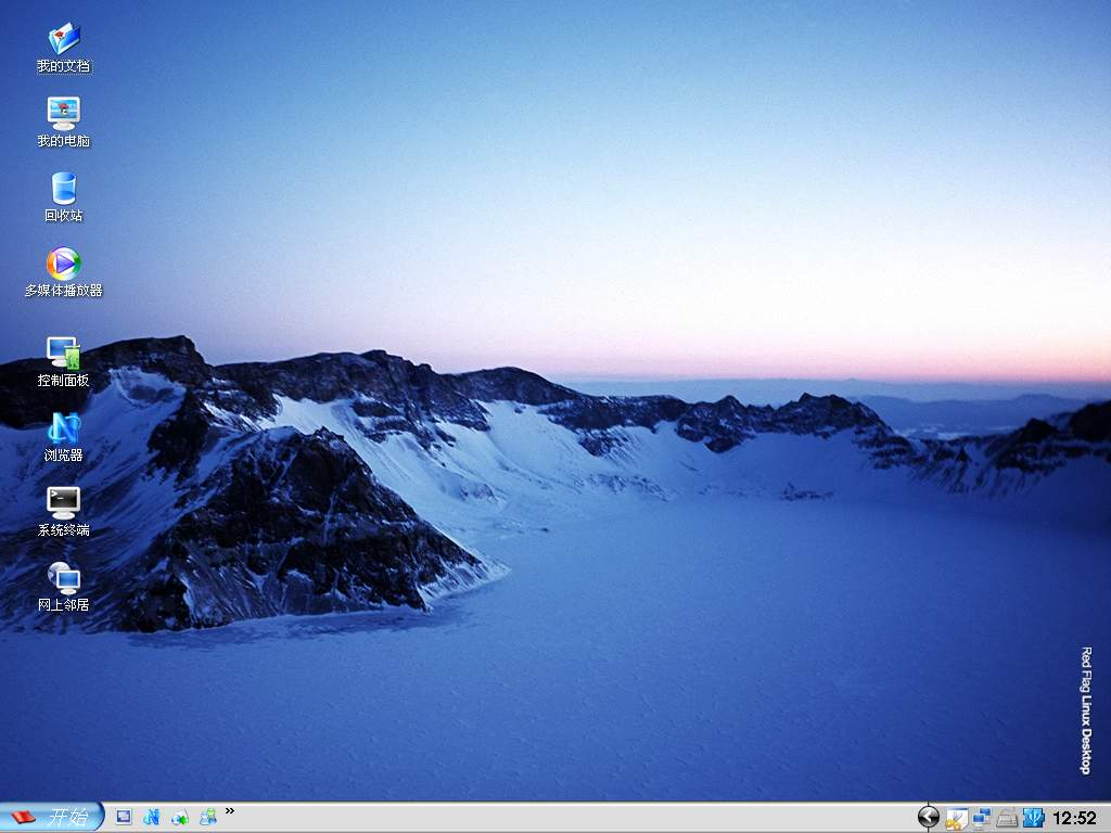 红旗Linux5.0桌面截图